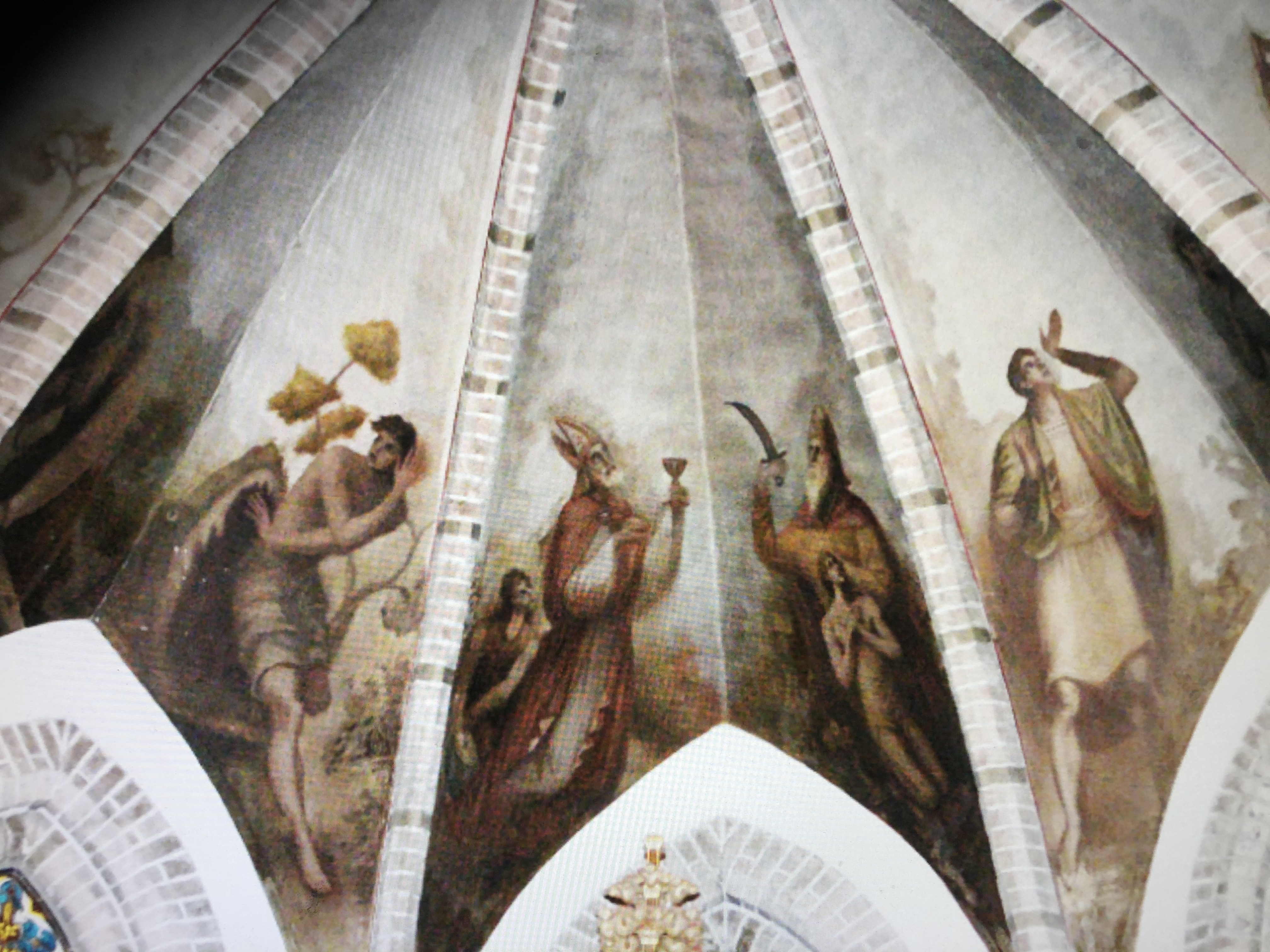 foto van het gewelf met gewelfschilderingen detail